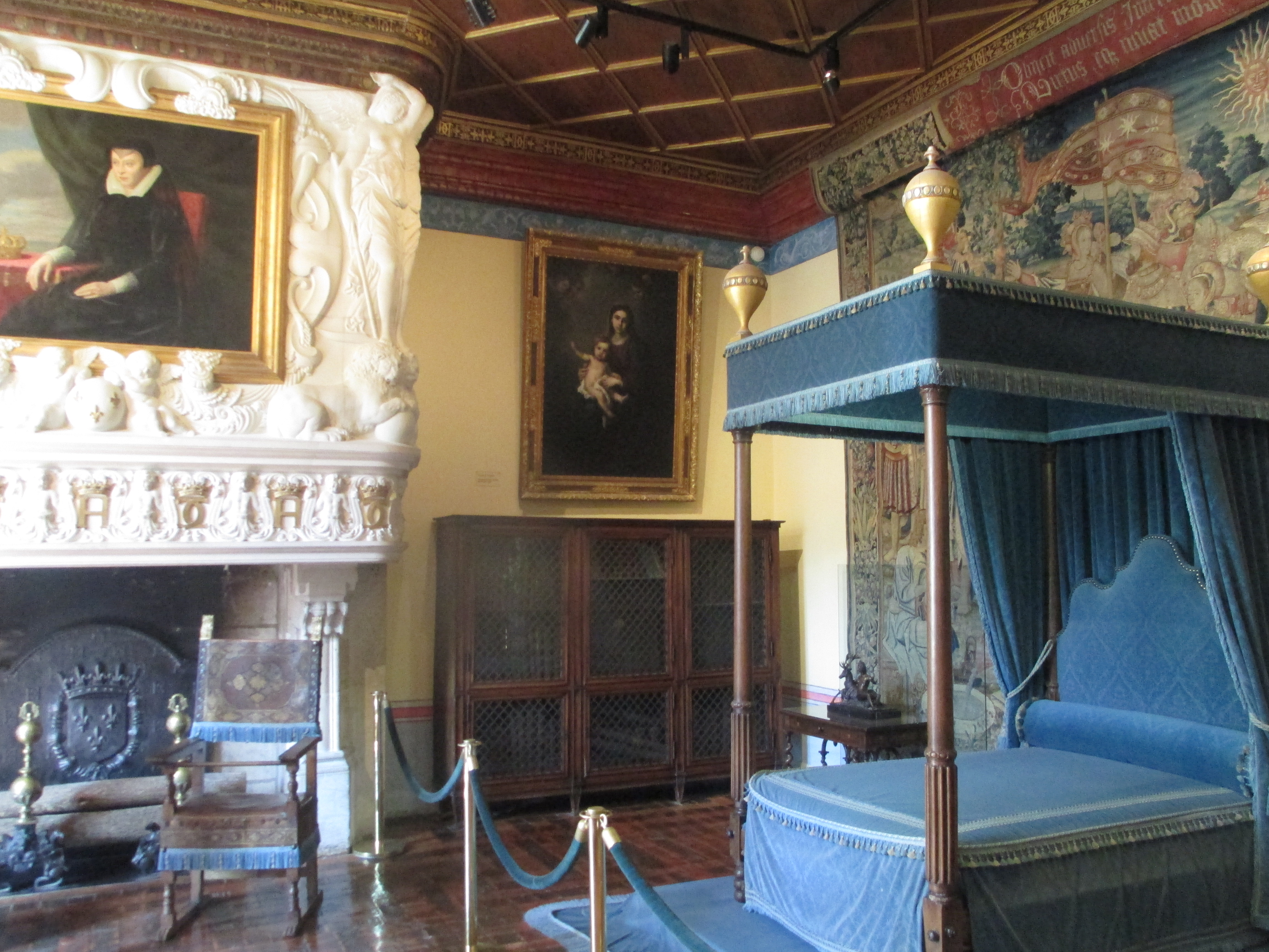 חדרה של דיאן דה פואטייה בטירת שנונסו. בתמונה-קתרין דה מדיצ'י